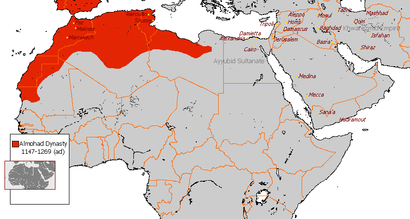 Almohad dynasty (1147-1269)